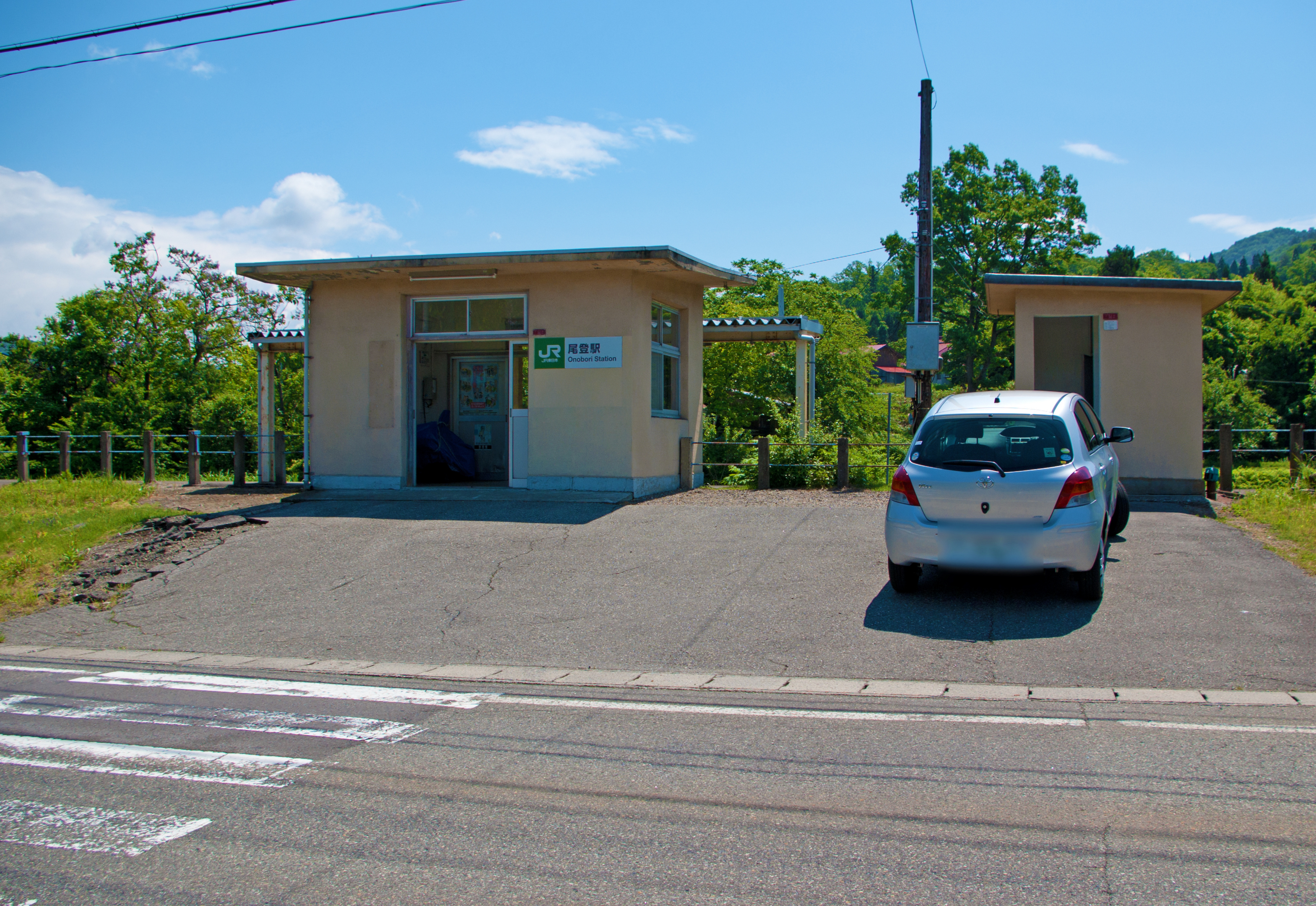 東日本旅客鉄道株式会社磐越西線尾登駅